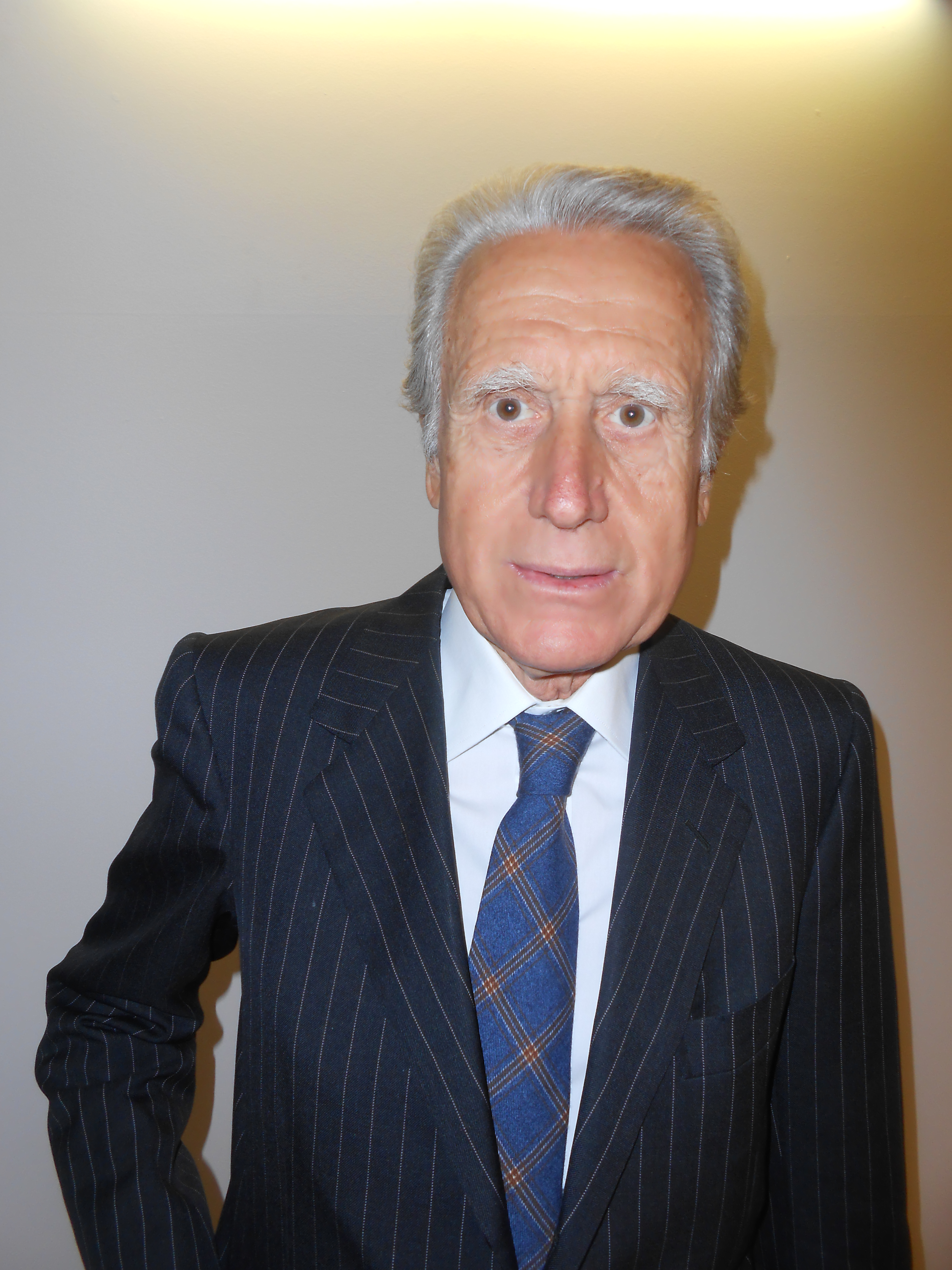 Giancarlo Aragona Vice Presidente Science for Peace